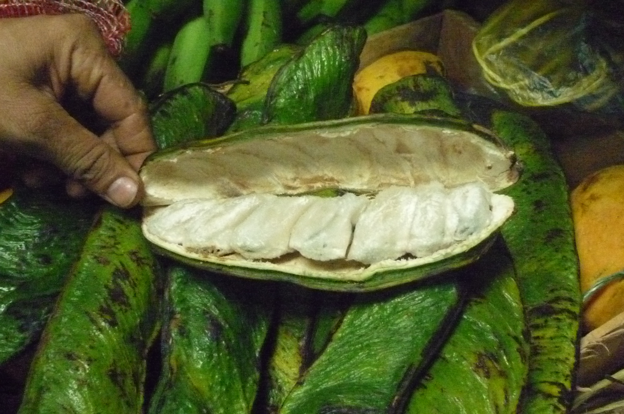 Guama